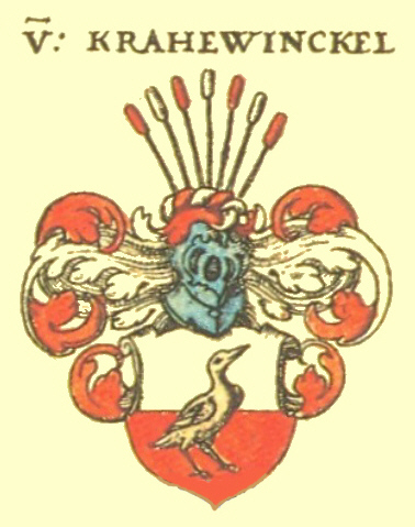 Wappen der Meißner Adelsfamilie Krahwinkel